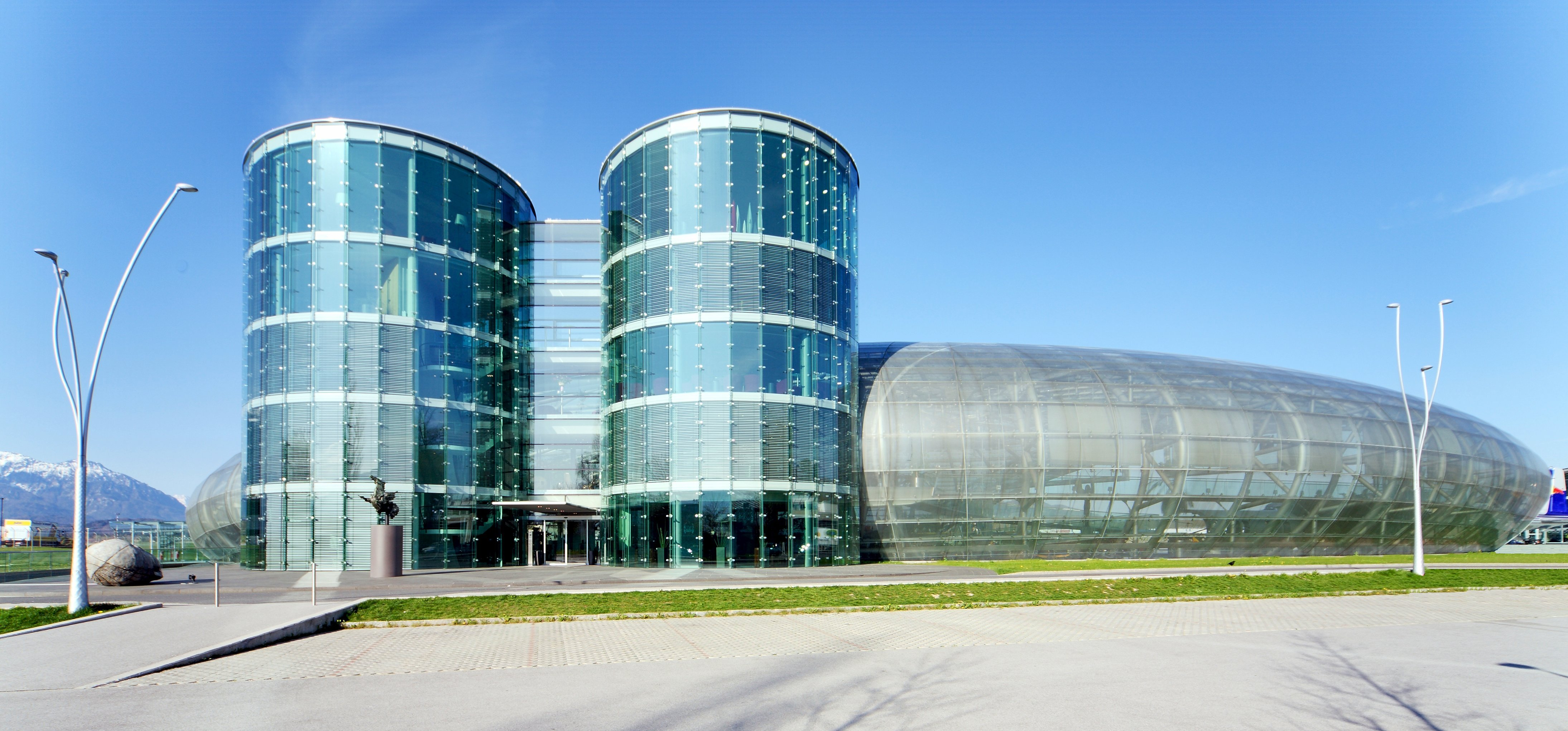 Hangar 7 Flughafen Salzburg